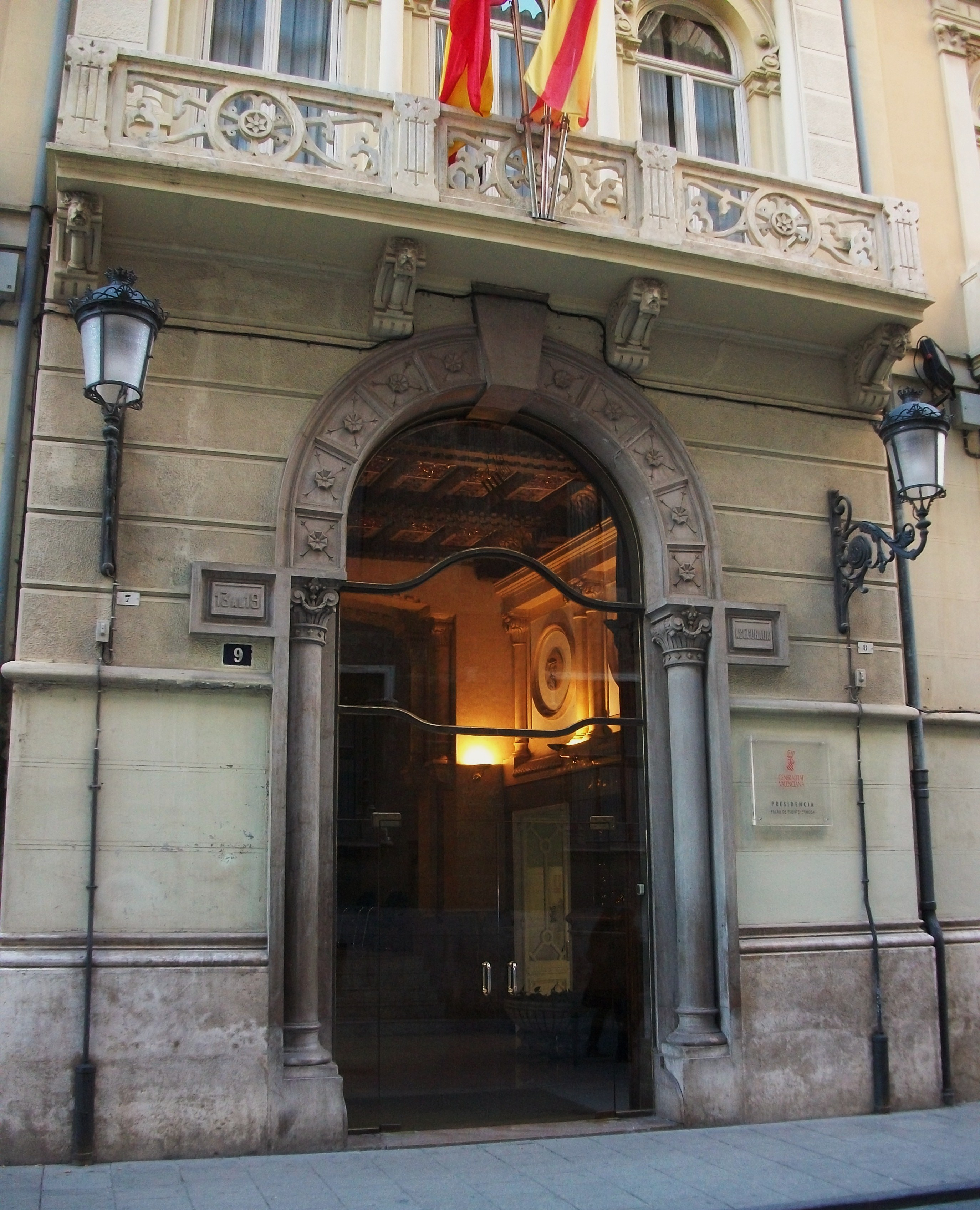 Porta del palau de Fuentehermosa o Castellfort de València.